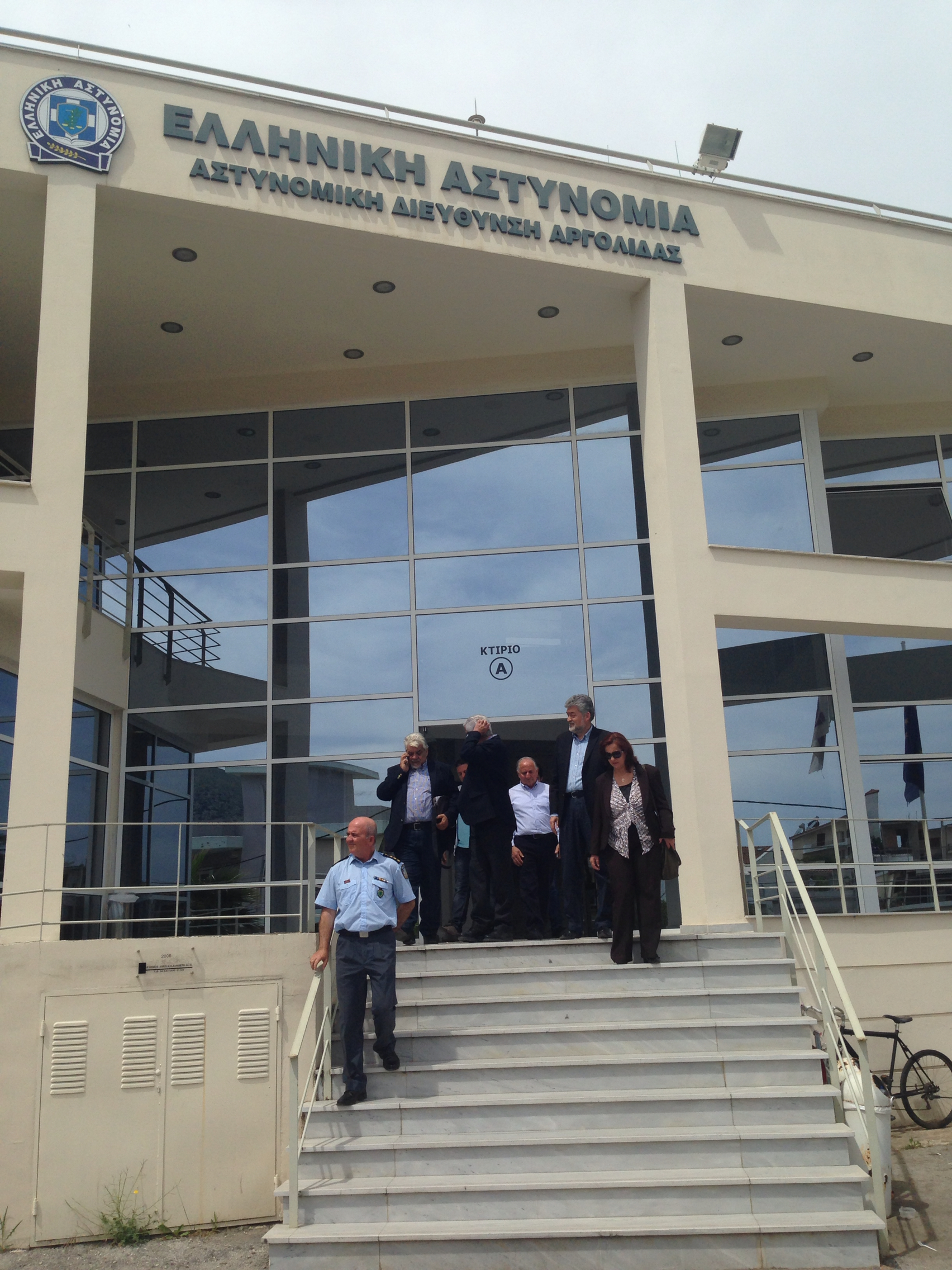 Κατά την έξοδό του από την Αστυνομική Διεύθυνση